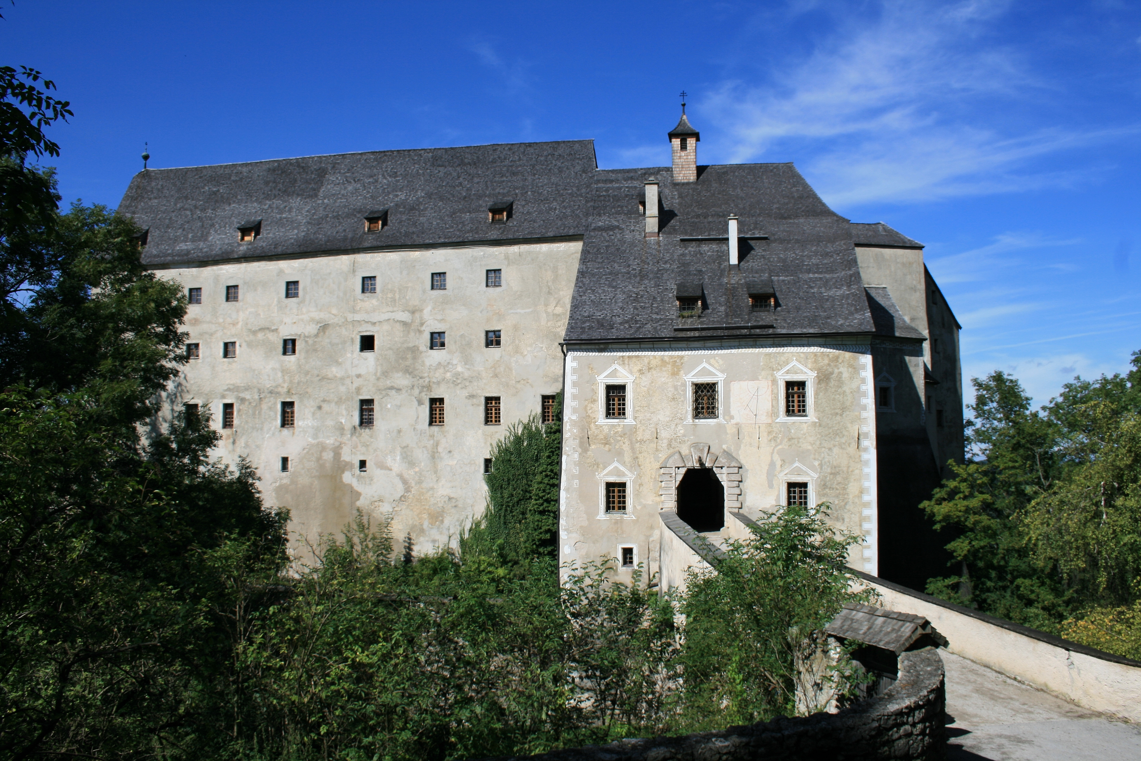 Vorderansicht der Burg Altpernstein mit Brücke und Portal